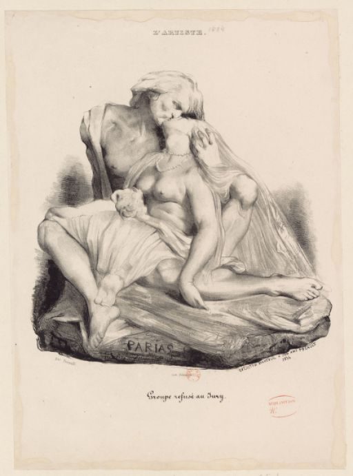 Gravure de Célestin Nanteuil représentant l'œuvre d'Auguste Préault intitulée Parias, refusée au Salon de 1834 et aujourd'hui disparue.